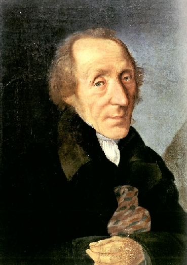 Christoph Hawich Selbstporträt, Öl auf Leinwand, 1828 (Stadtmuseum Simeonstift)